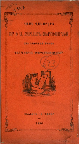 Обложка издания «О монастырях в святом городе Иерусалиме» армянского историка VII века Анастаса Вардапета